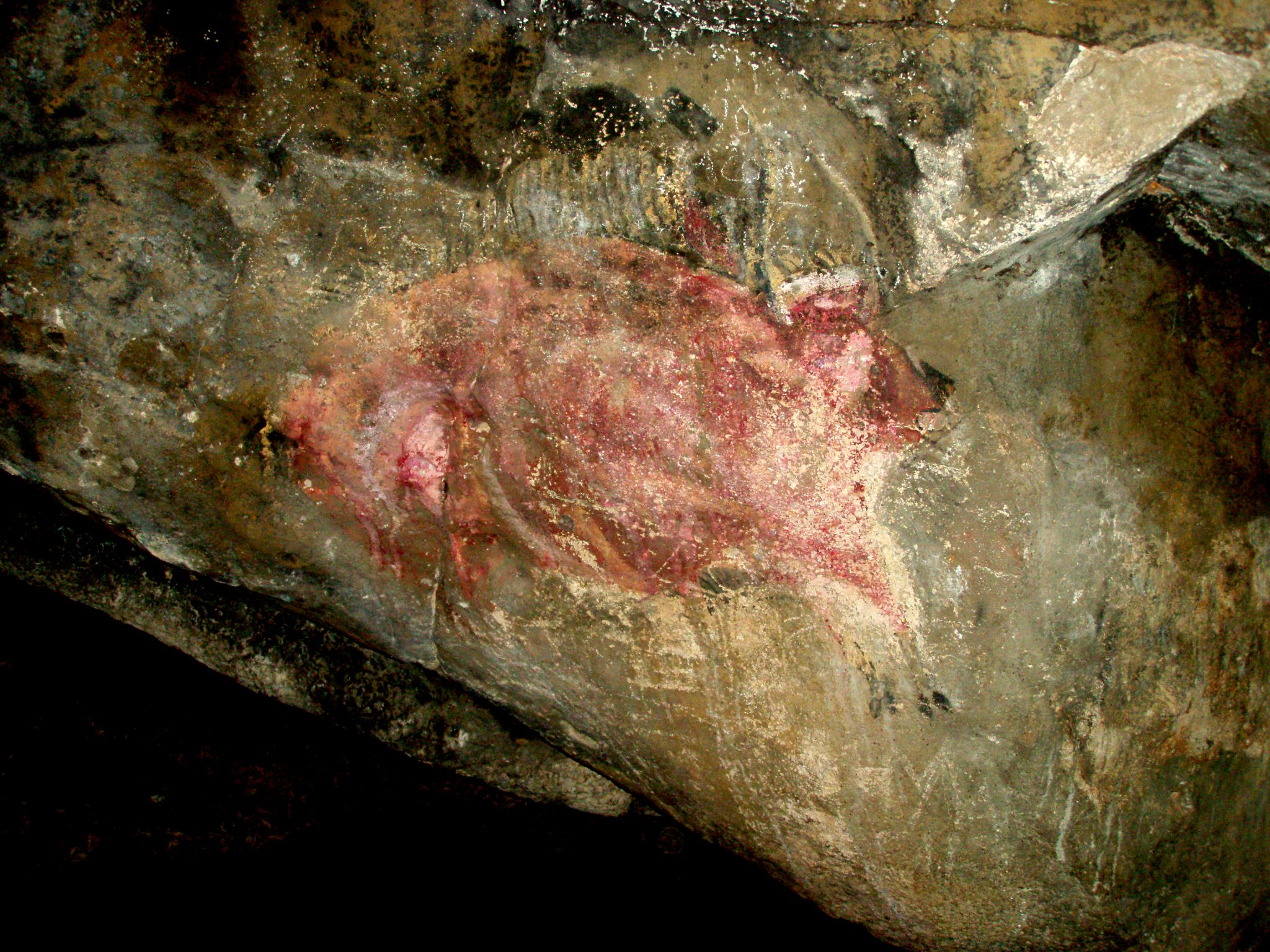 el vestíbulo de la cueva tiene esta pintura rupestre; no es esta la mejor foto, ver la del 2006-01-08 hecha con mi cámara analógica y sin flash, el resultado es mucho mejor